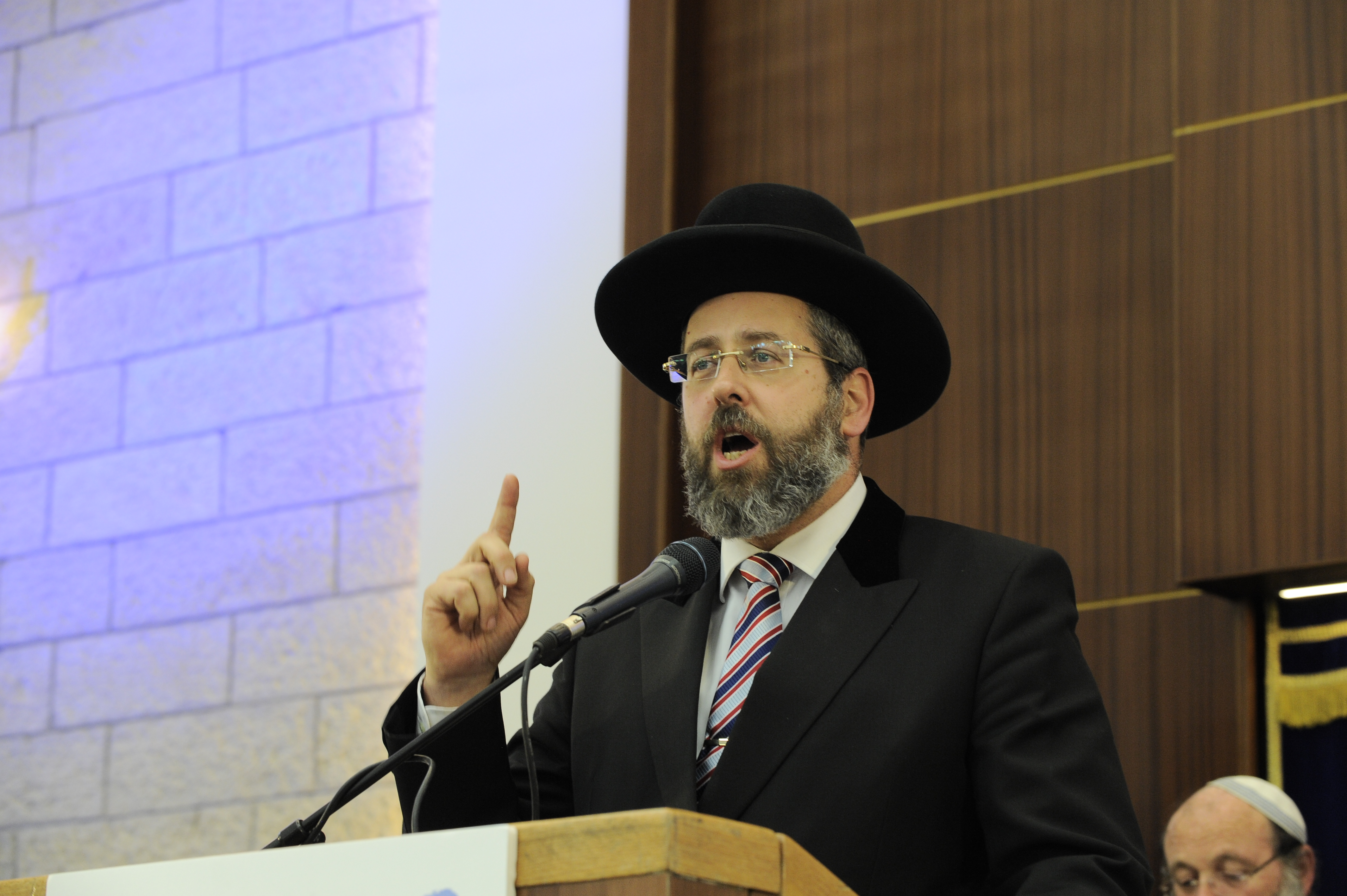 ישיבת מרכז הרב.